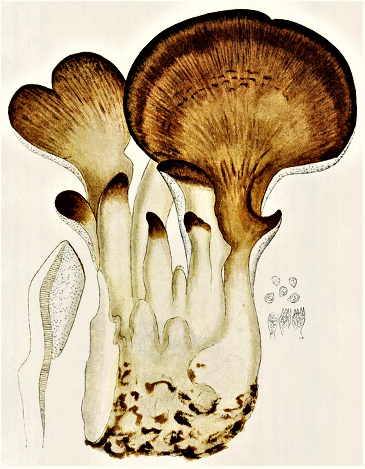 Polyporus giganteus (Pers., 1794) Fr. (1815), heute Meripilus giganteus (Pers., 1794) P. Karst. (1882)